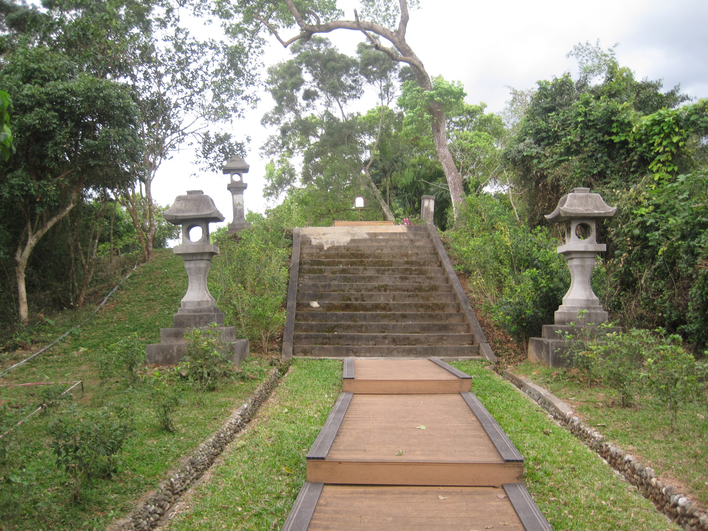 玉里社參道與石燈籠